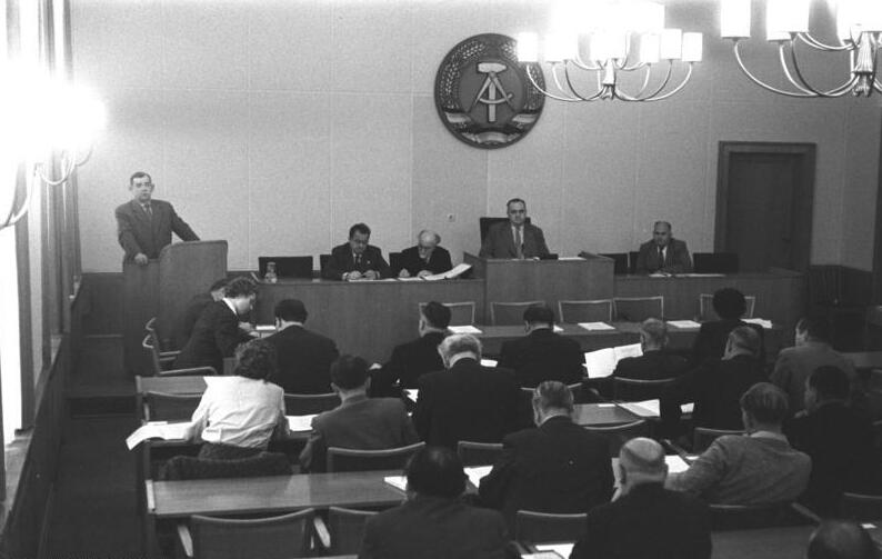 Berlin, Länderkammer Zentralbild/Sturm/Junge 24.9.1958 Länderkammer billigte Gesetz über Volkskammerwahlen. Die Länderkammer der DDR billigte in Ihrer 21. Sitzung am 24.9.1958 kurz nach der 36. Volkskammertagung einstimmig das "Gesetz über die Wahlen zur Volkskammer der DDR". Die Länderkammerabgeordneten gaben auch den übrigen von der 36. Volkskammertagung beschlossenen Gesetzen ihre einmütige Zustimmung. UBz: Blick in den Plenarsaal der Länderkammer während der Begründung des Wahlgesetzes durch Minister Maron. Abgebildete Personen: Maron, Karl: Innenminister, Generaloberst, Volkskammerabgeordneter, SED, DDR